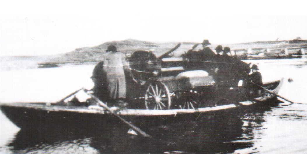 Ferja før Hafrsfjordbrua